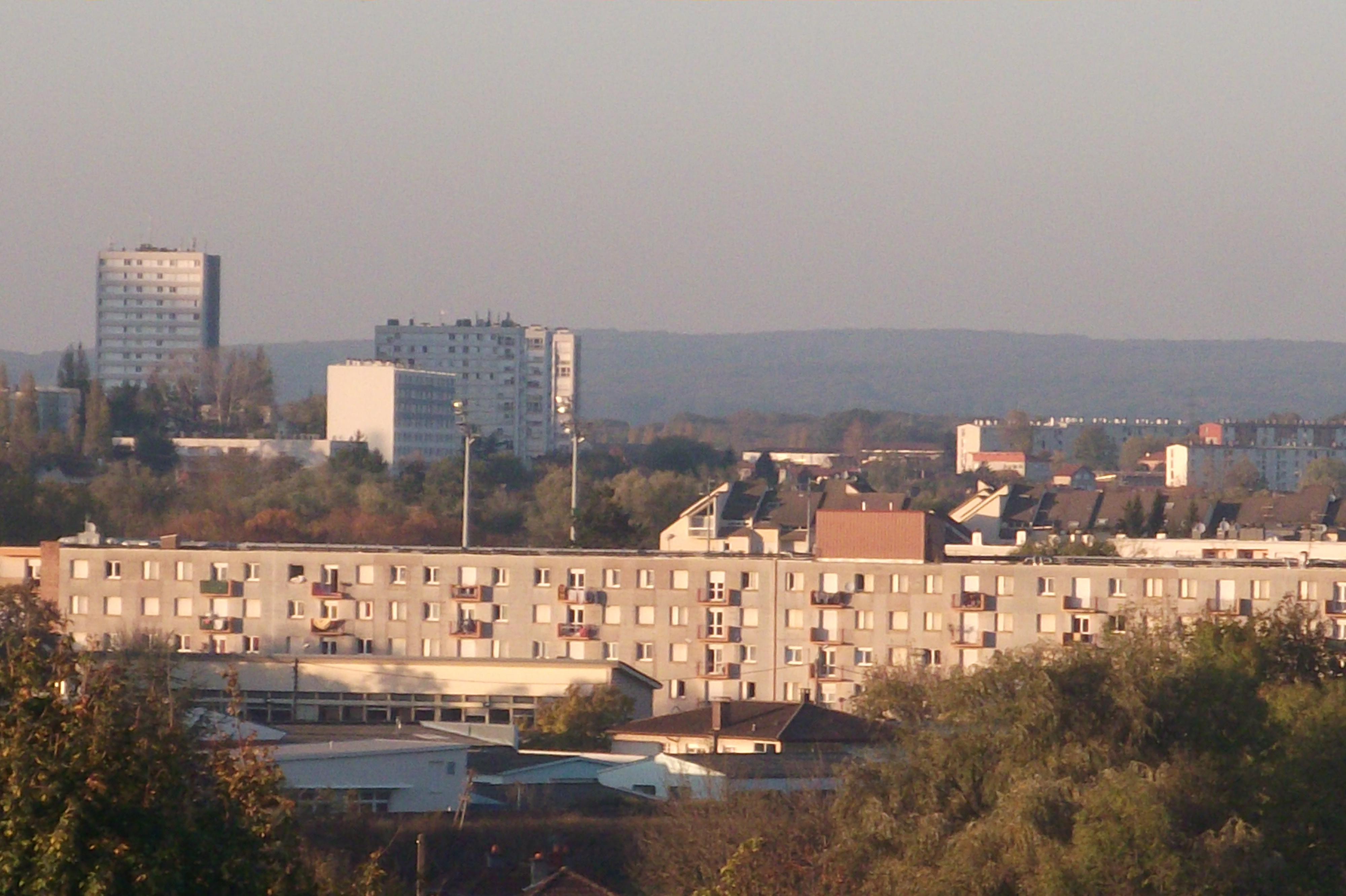 Des barres et des tours à Vesoul